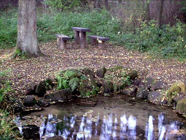 Silbersandquelle in Kirkel